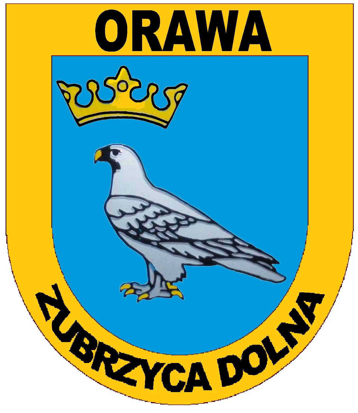 Herb Zubrzycy Dolnej (nieoficjalny ponieważ z dodatkiem obramowania żółtego i z napisami)